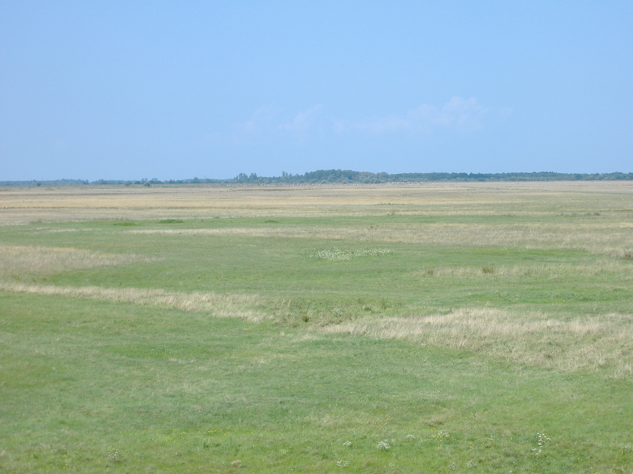 a hortobágyi puszta a Szálka-halmi kilátóból